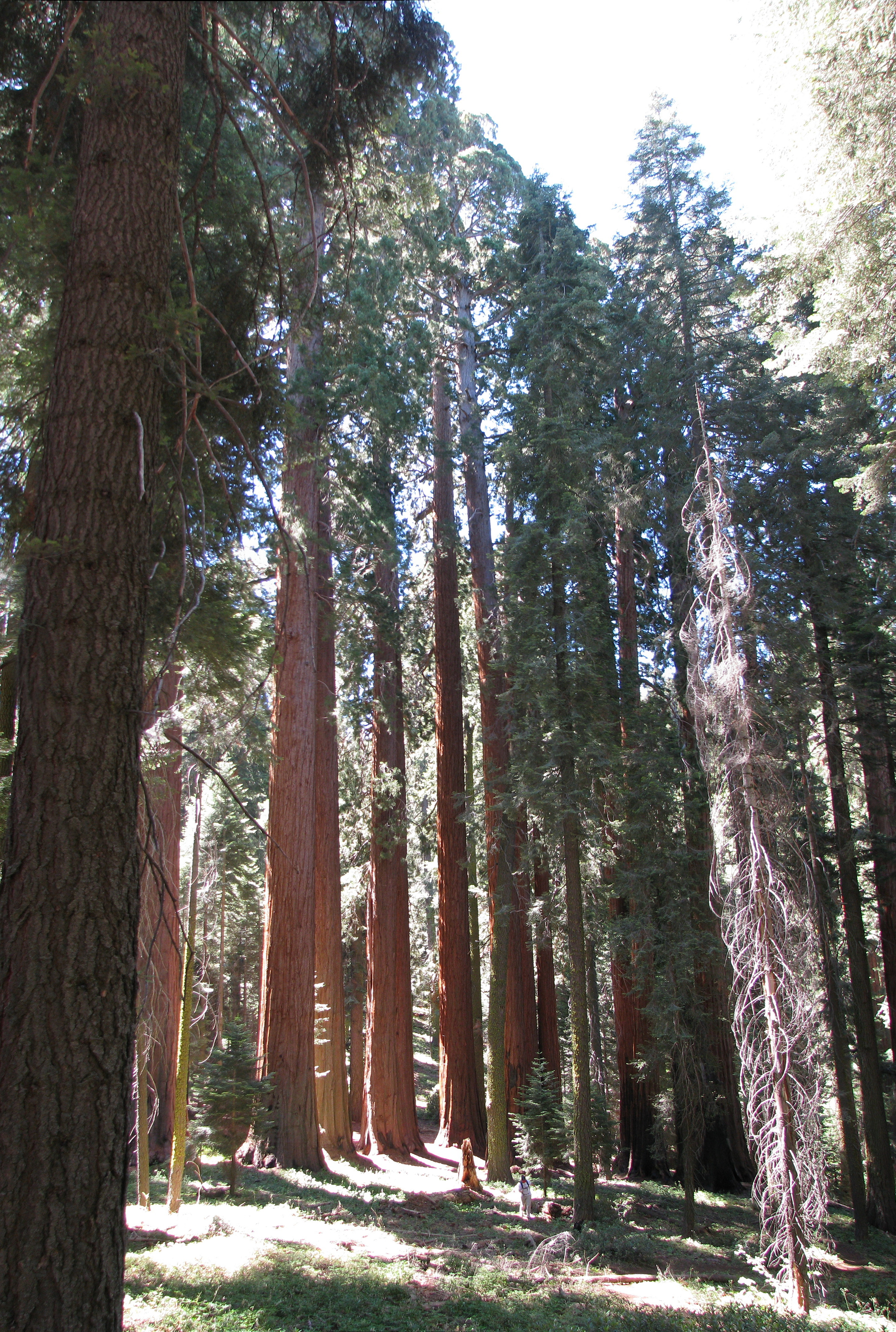 HikerStandingAmidstGiantSequoias